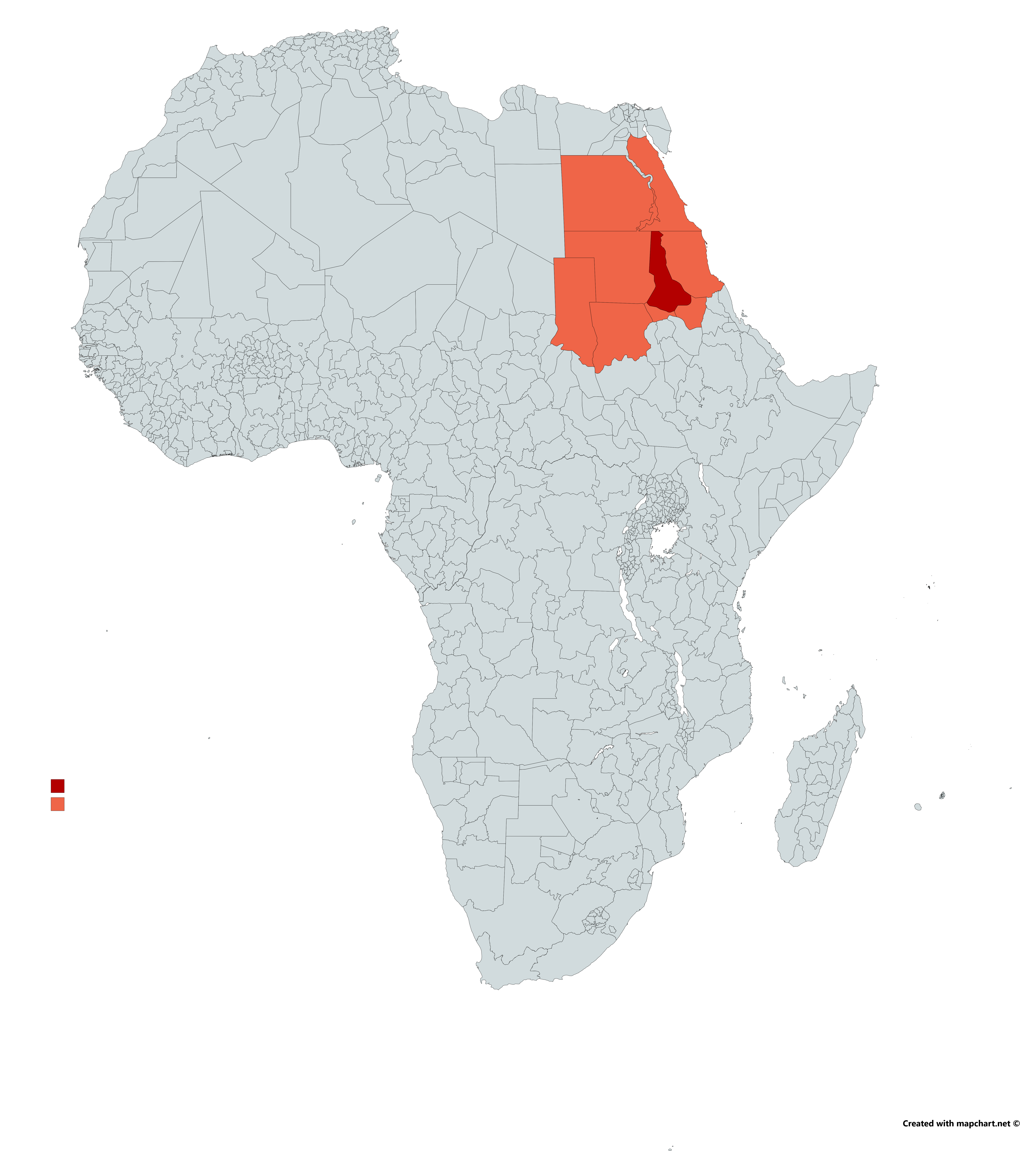 Dispertion du peuple Ababdehs